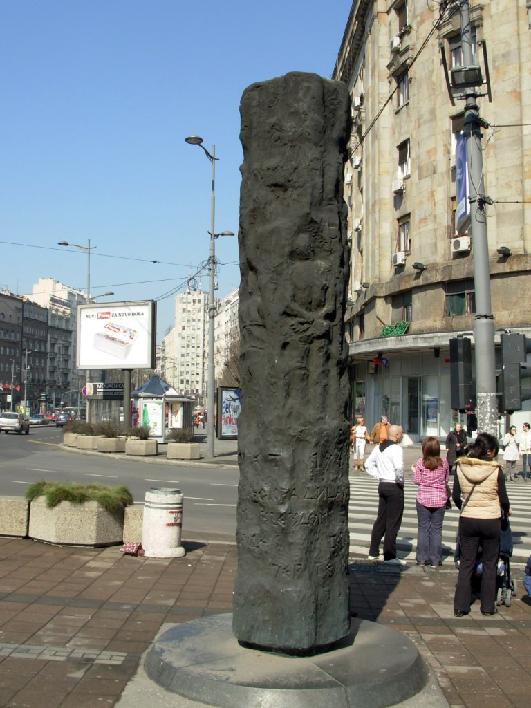 Spomenik rodoljubima koje su nemački fašisti obesili 17. avgusta 1941 na Terazijama u Beogradu. Slikao Goldfinger